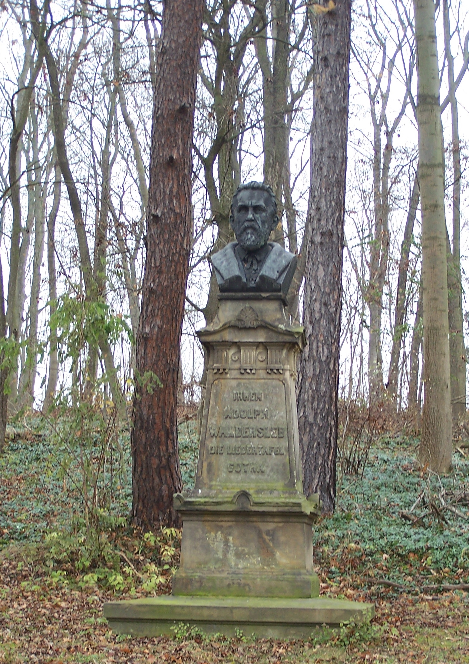 Gedenkstein A. wandersleb auf dem Krahnberg in Gotha.